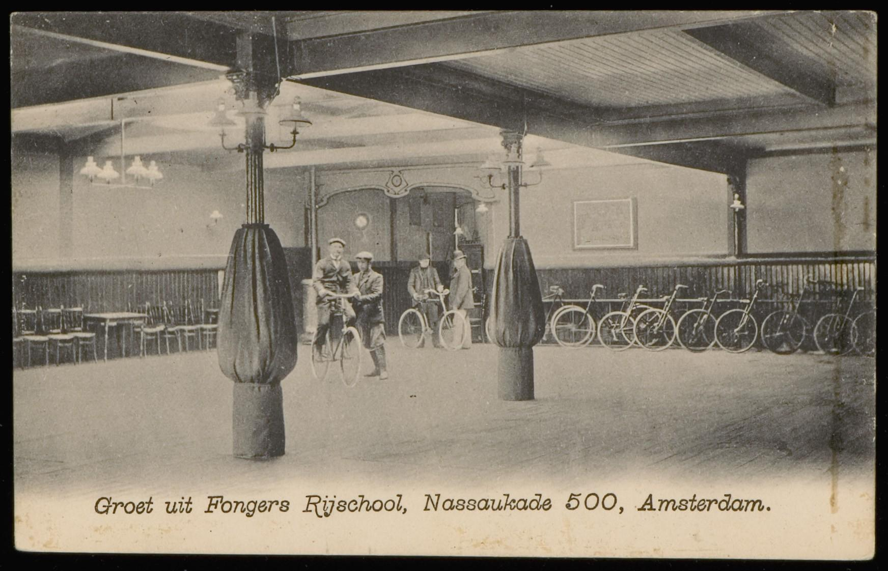 Beschrijving Nassaukade 500, de Fongers Rijschool Documenttype prentbriefkaart Vervaardiger Onbekend Anoniem Collectie Collectie Stadsarchief Amsterdam: prentbriefkaarten Datering 1901 ca. Geografische naam Nassaukade Inventarissen Afbeeldingsbestand PBKD00080000009